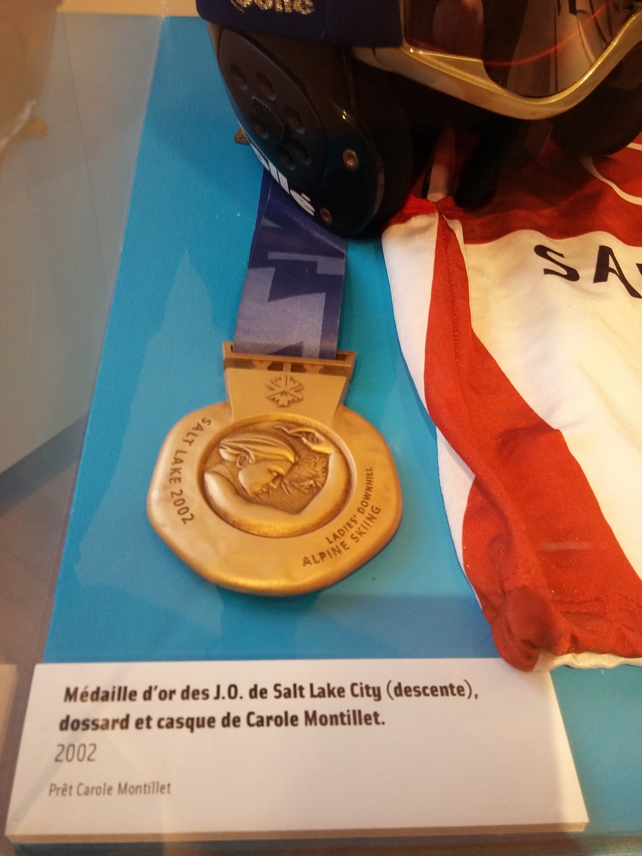 Médaille d'or de la skieuse française Carole Montillet aux jeux olympiques de 2002.